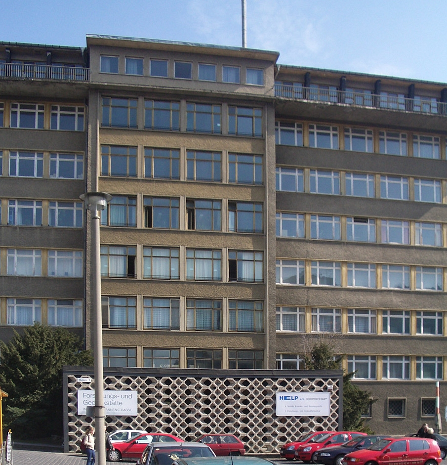 Berlin-Lichtenberg: Ministerium für Staatssicherheit Normannenstraße, Gebäude 1 (Ruschestraße 103), u.a. mit dem Büro von Erich Mielke; heute Forschungs- und Gedenkstätte Normannenstraße.